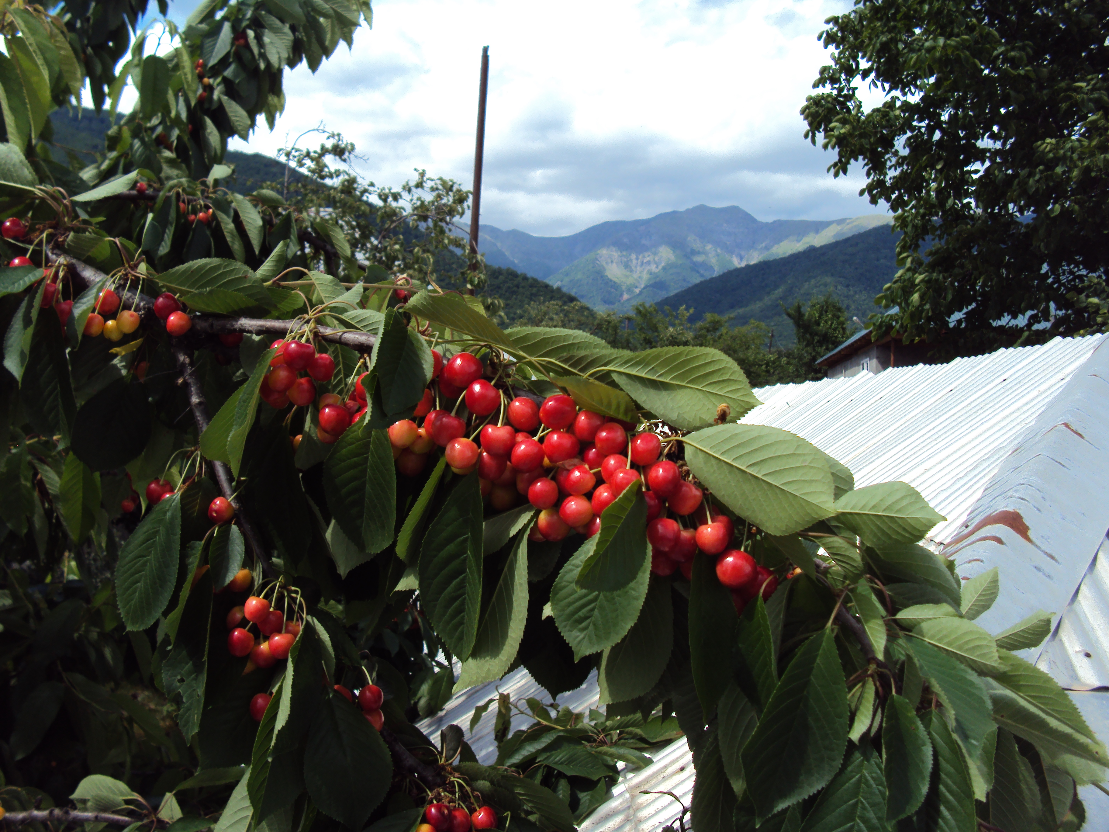 Oğuz dağlarına bağdan mənzərə